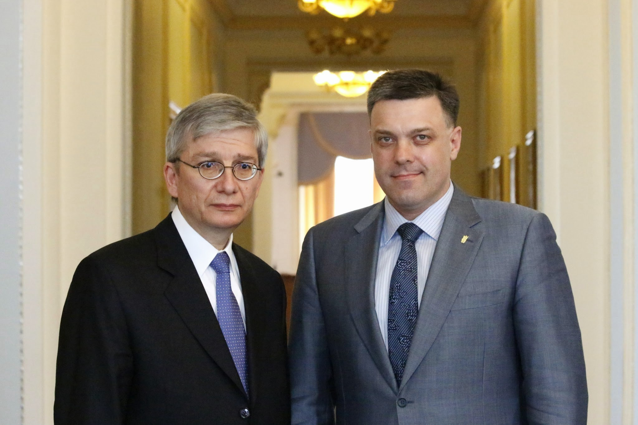 Oleh Tyahnybok and Eugene Czolij.